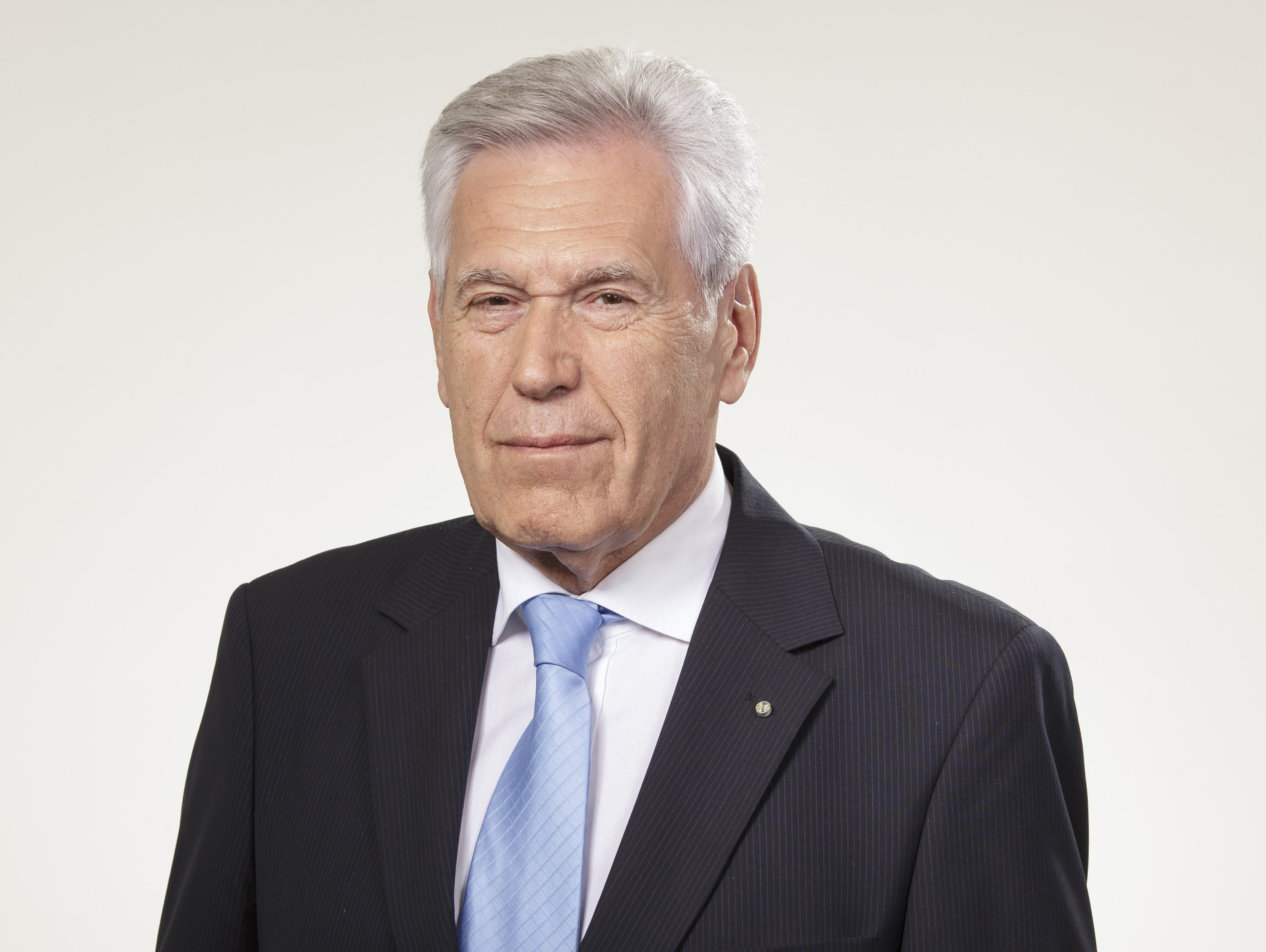 Michael Glos, MdB (2012)